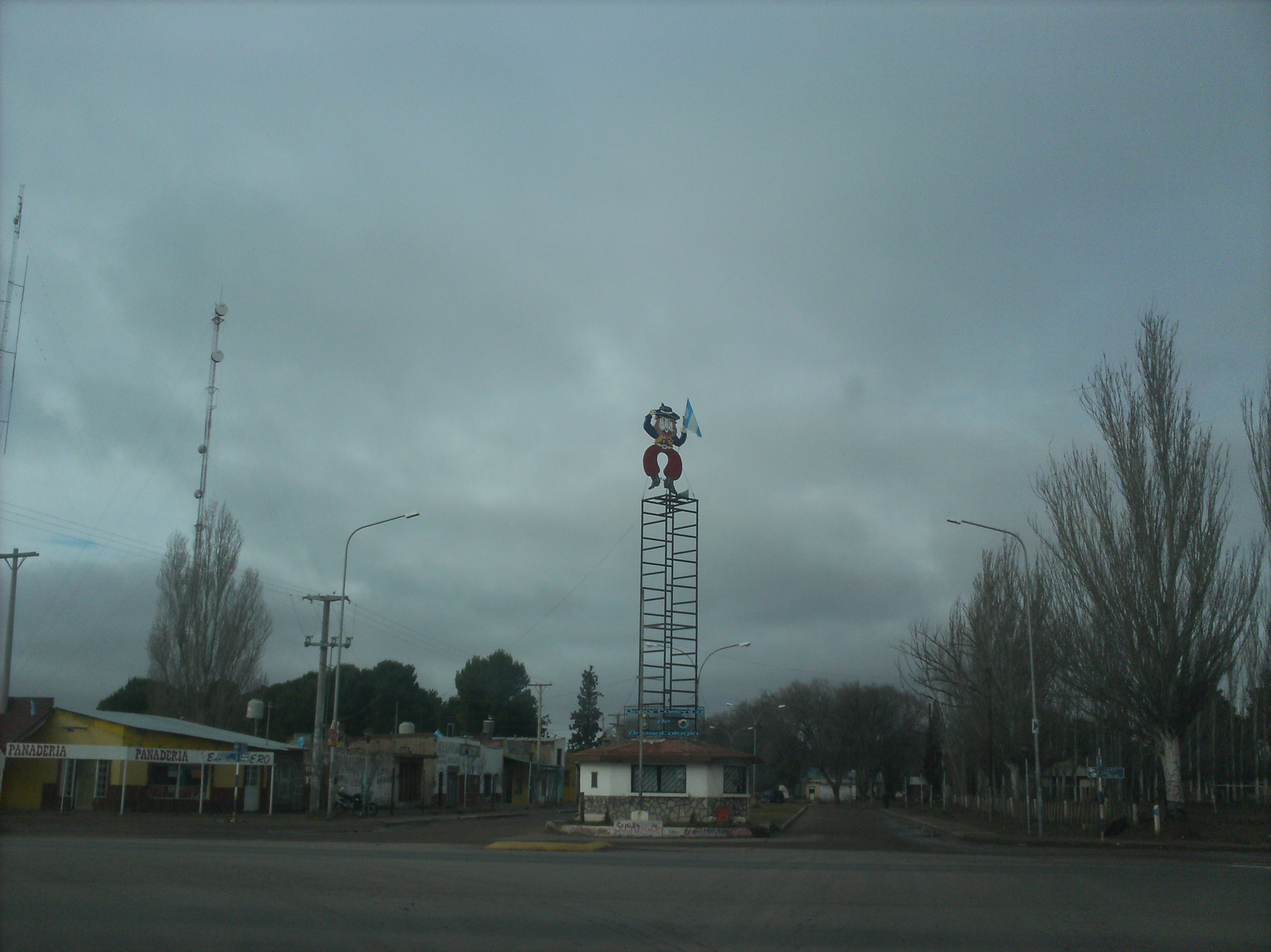 Parte principal del pueblo